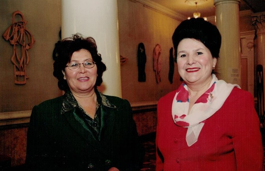 Аҡкучукова Роза - Башҡортостан Республикаһының халыҡ артисы һәм шағирә Гүзәл Ситдиҡова